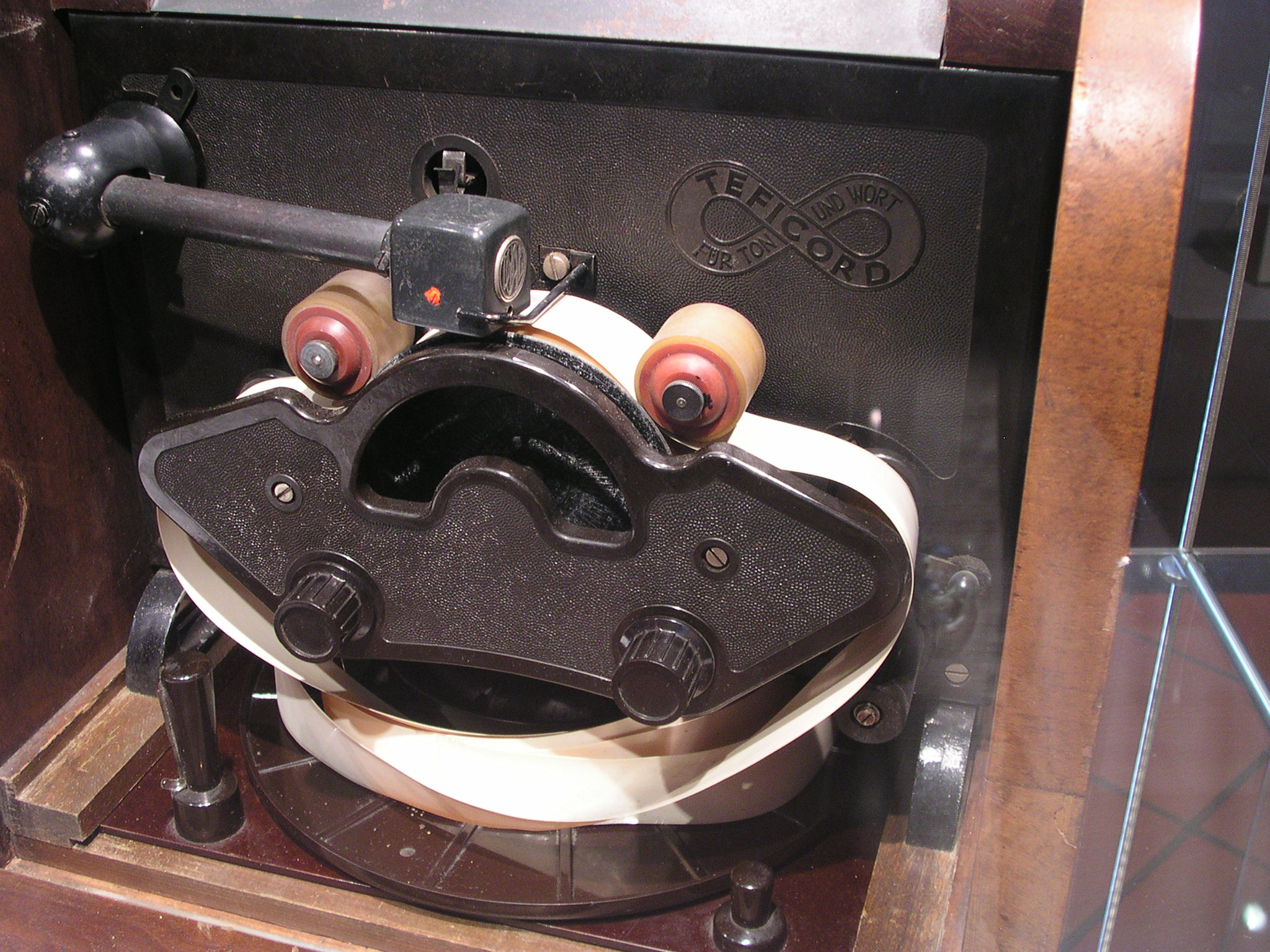 Teficord